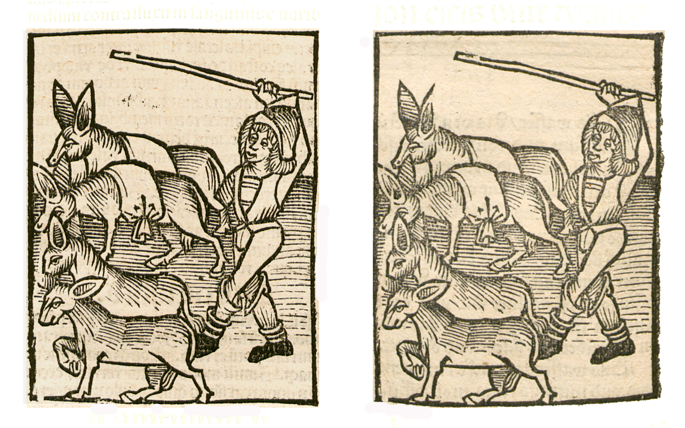 Abbildung von: Eselsblut